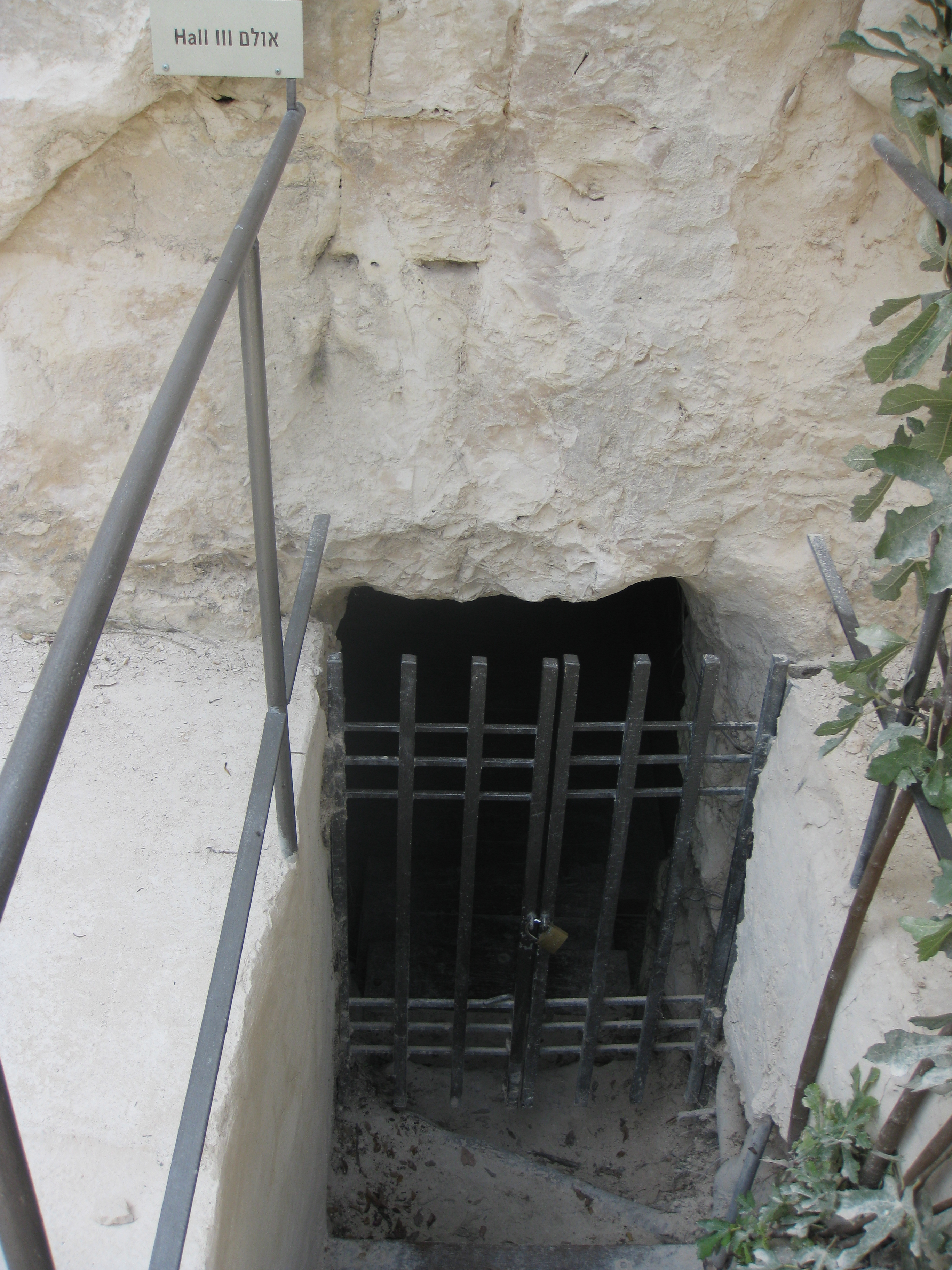 Mount Scopus הר הצופים